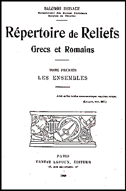 Répertoire de reliefs grecs et romaines par Salomon Reinach